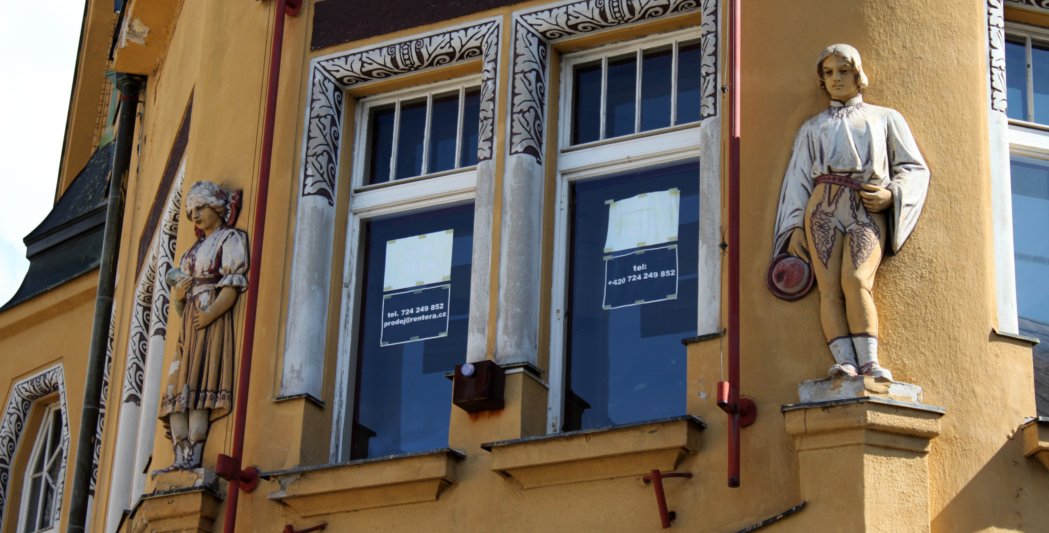 514 01 Jilemnice, Czech Republic